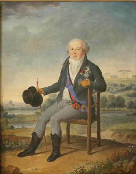 Kurakin